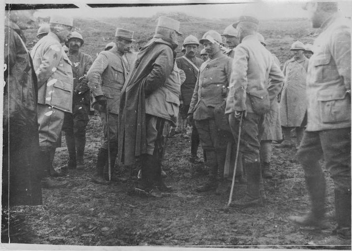 reportage photographique de l'armée française.